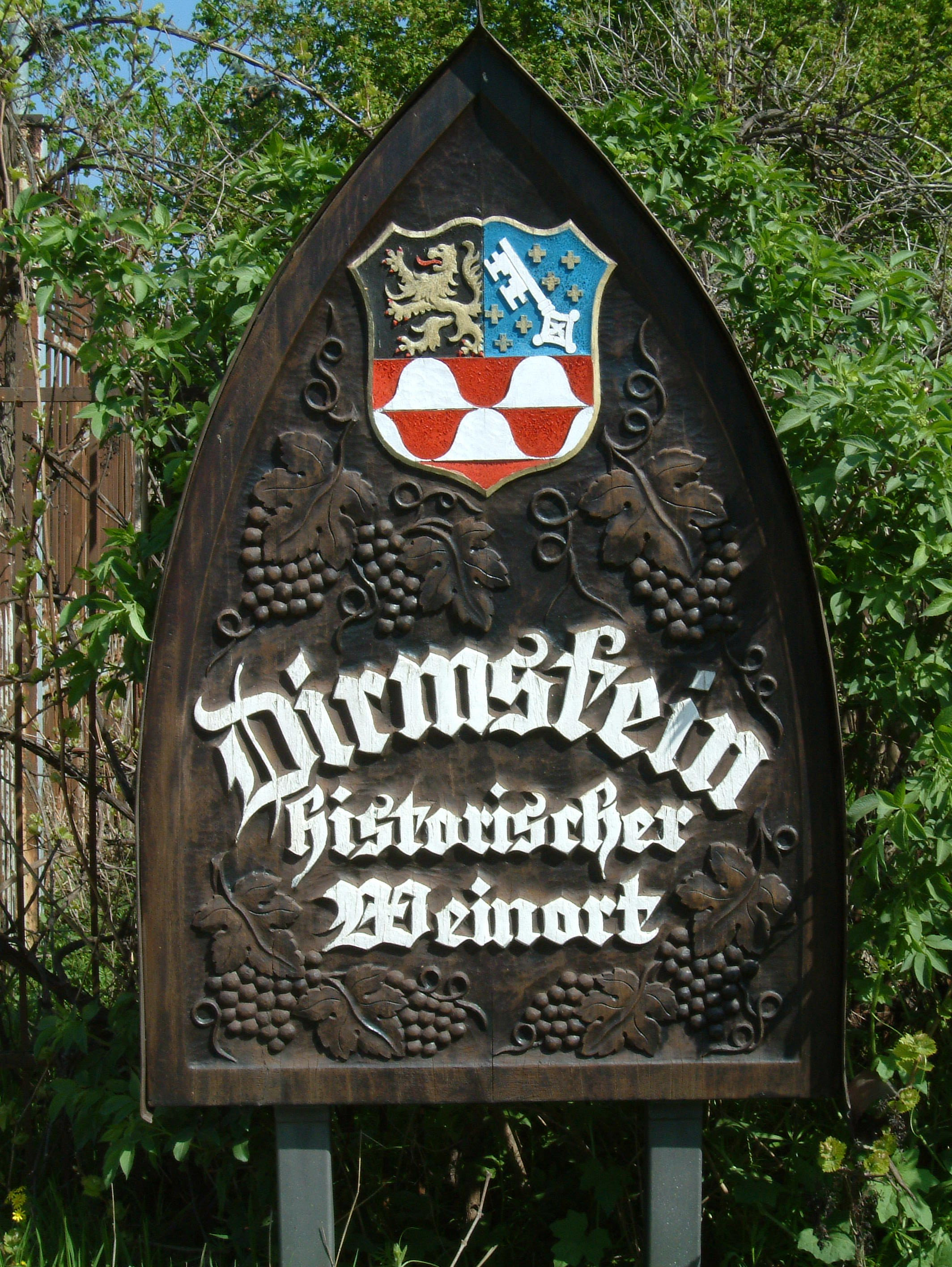 "Weinort"-Schild zu Dirmstein, selbst fotografiert am 2006-04-28 und freigegeben durch Benutzer:Mundartpoet